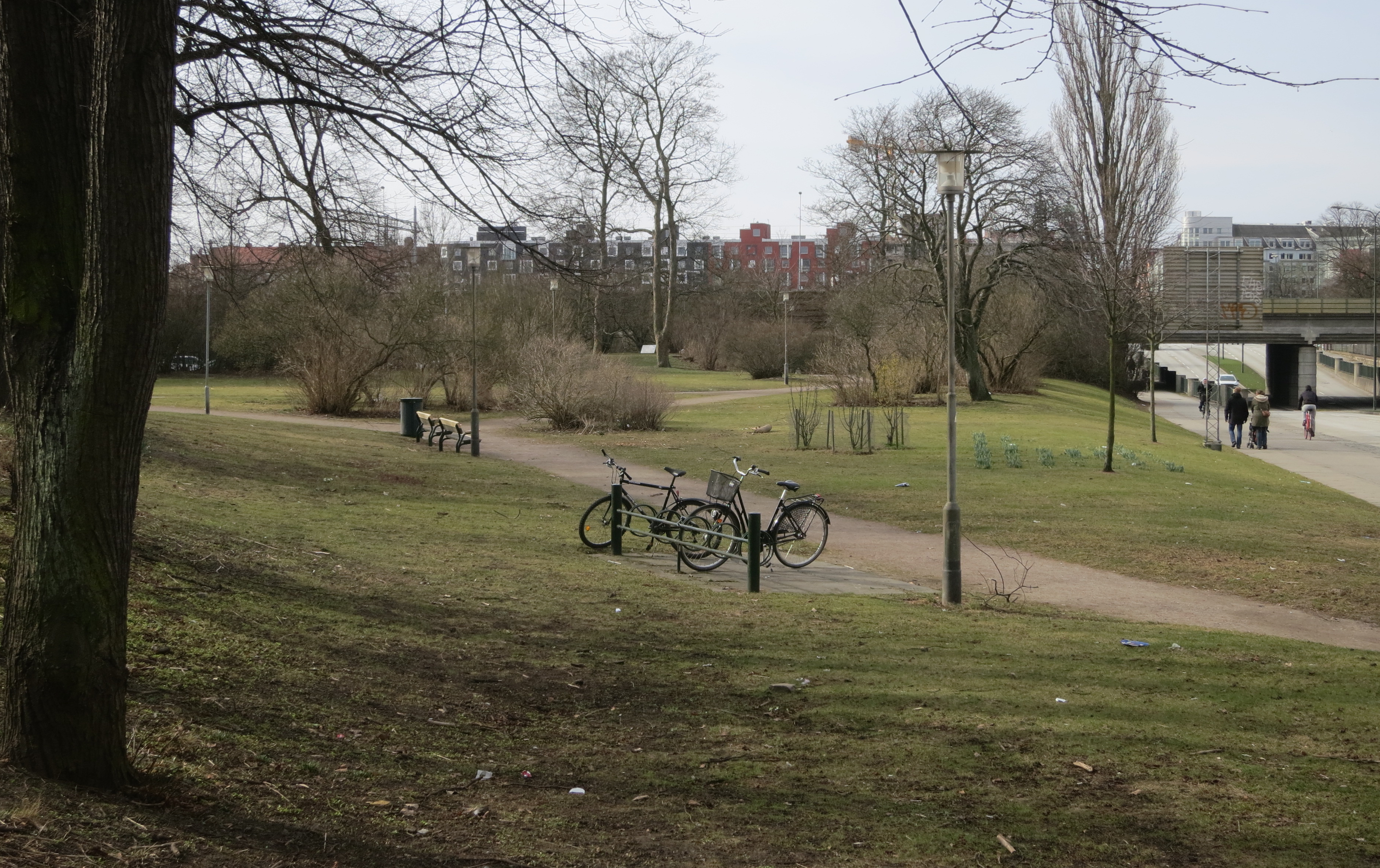 Gerlachs park i Kirseberg, Malmö